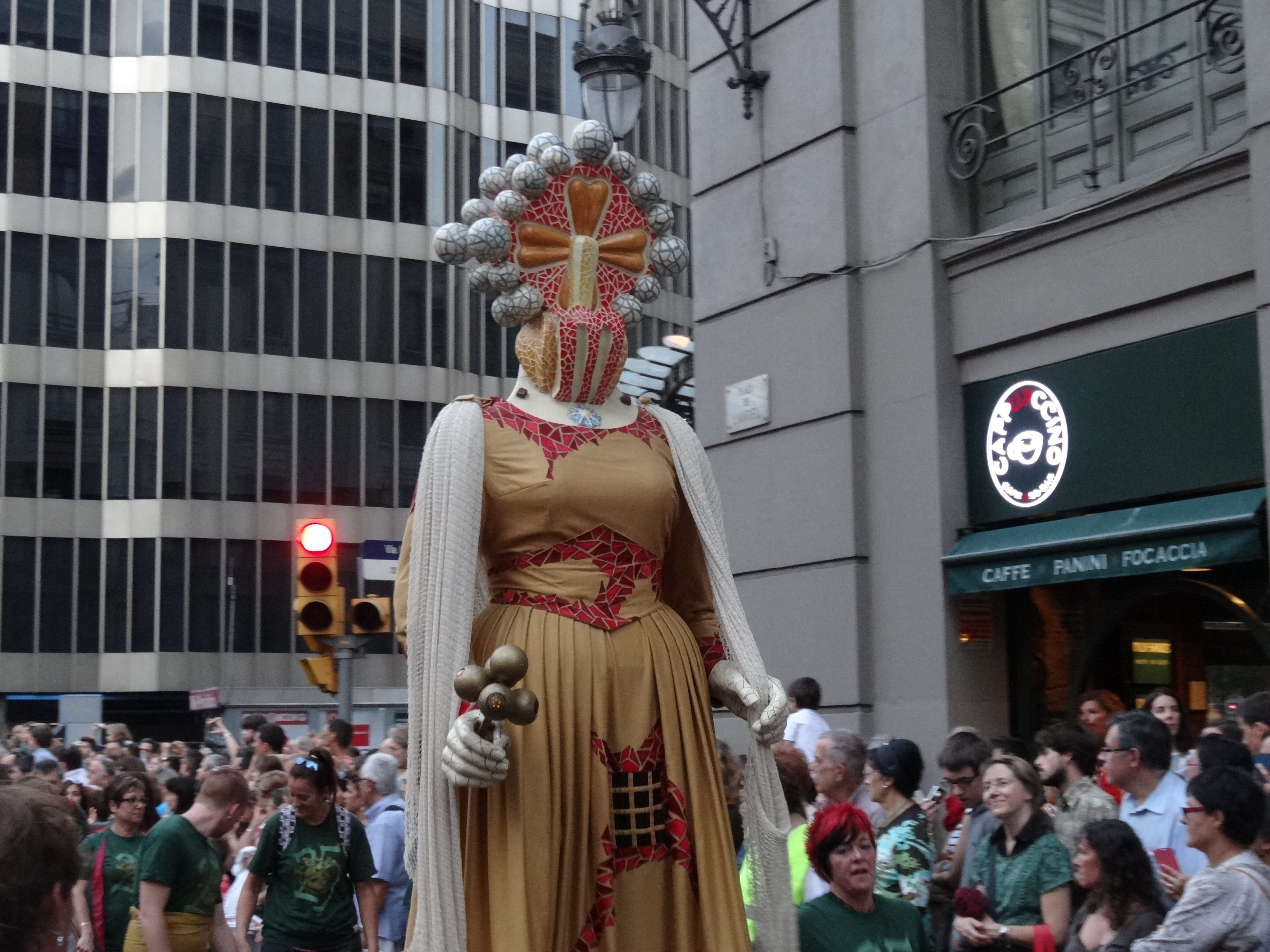 Cercavila de la Mercè 2013 a Barcelona. Gegantona Crespinella